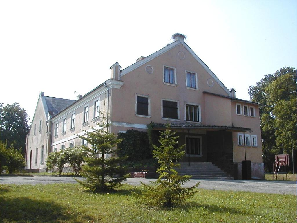 Dižlāņu muižas pils Vecpilī. 2002-08-25